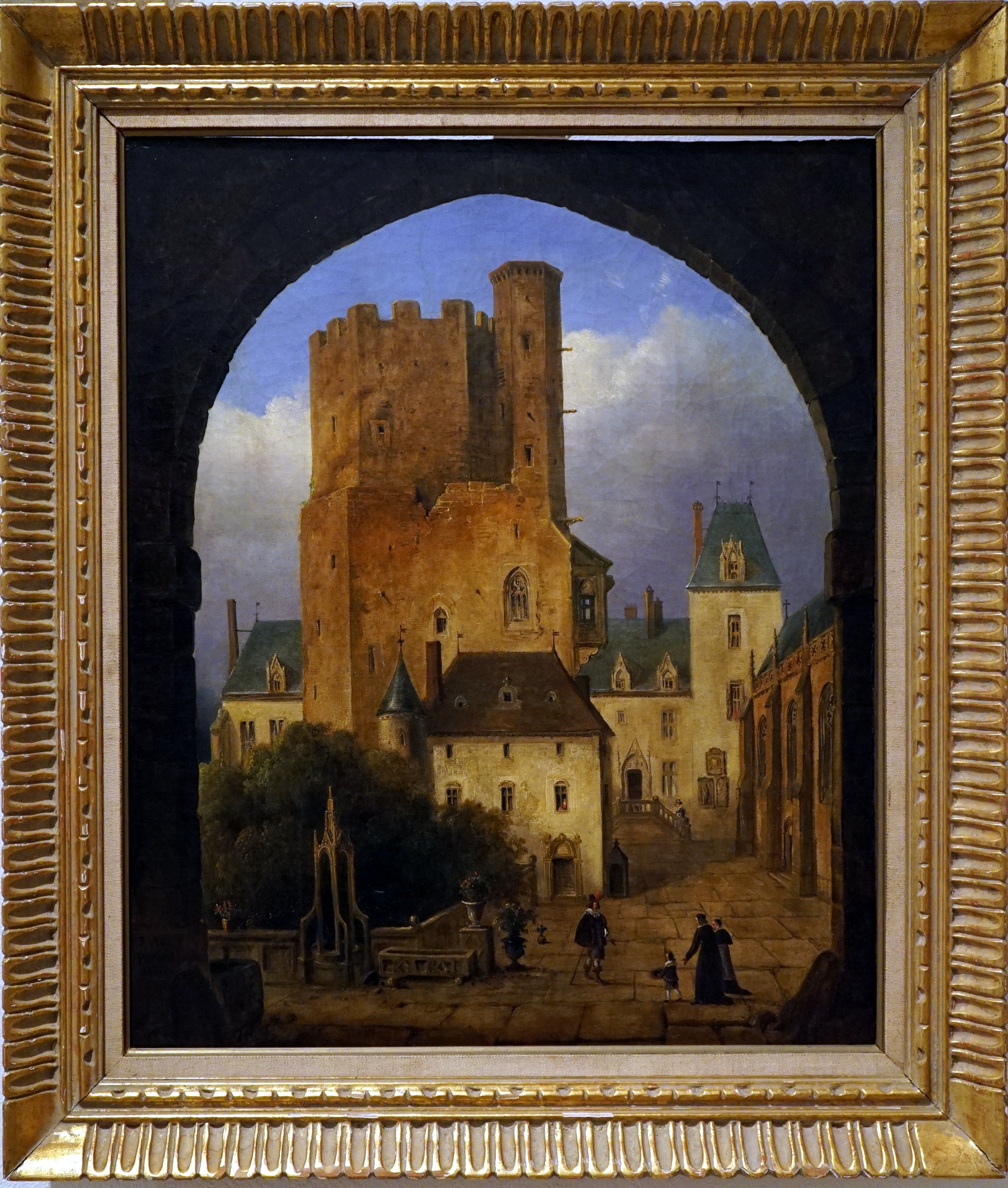 présenté au musée de Chaumont.